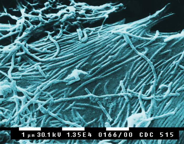 Aufnahme von Ebola-Viren mit einem SEM Scanning Electron Micrograph